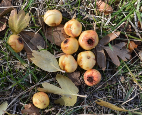 խոսրով